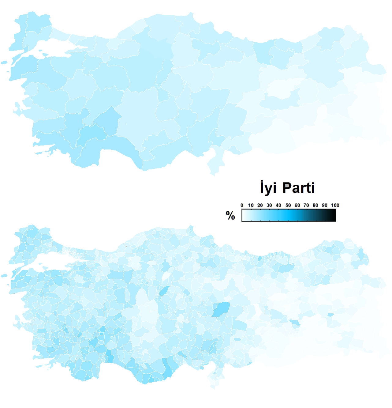 İyi parti 2018 genel seçimleri il/ilçe bazlı oy oranlarını gösteren harita